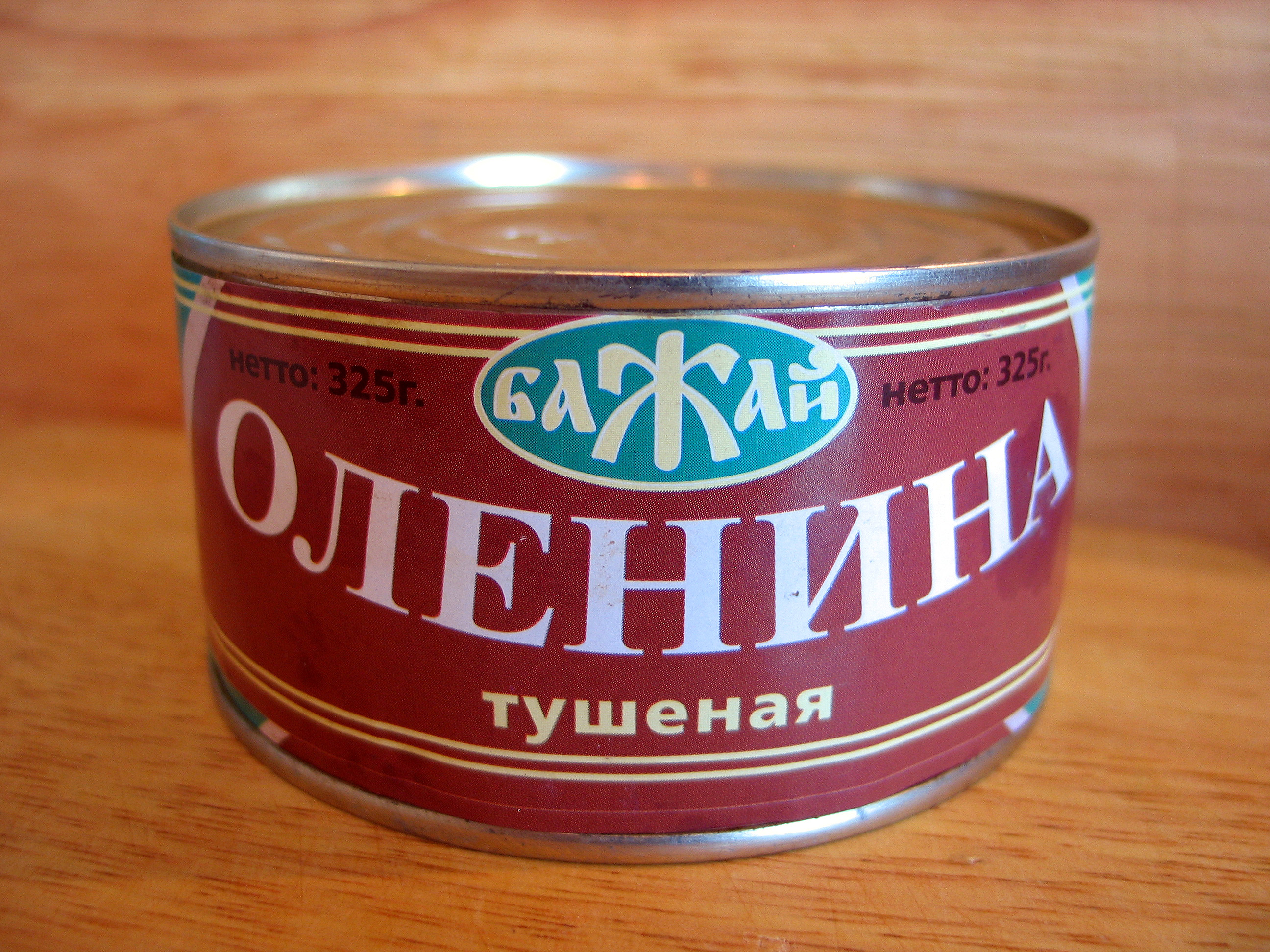 Фотография консервной банки Оленина тушеная